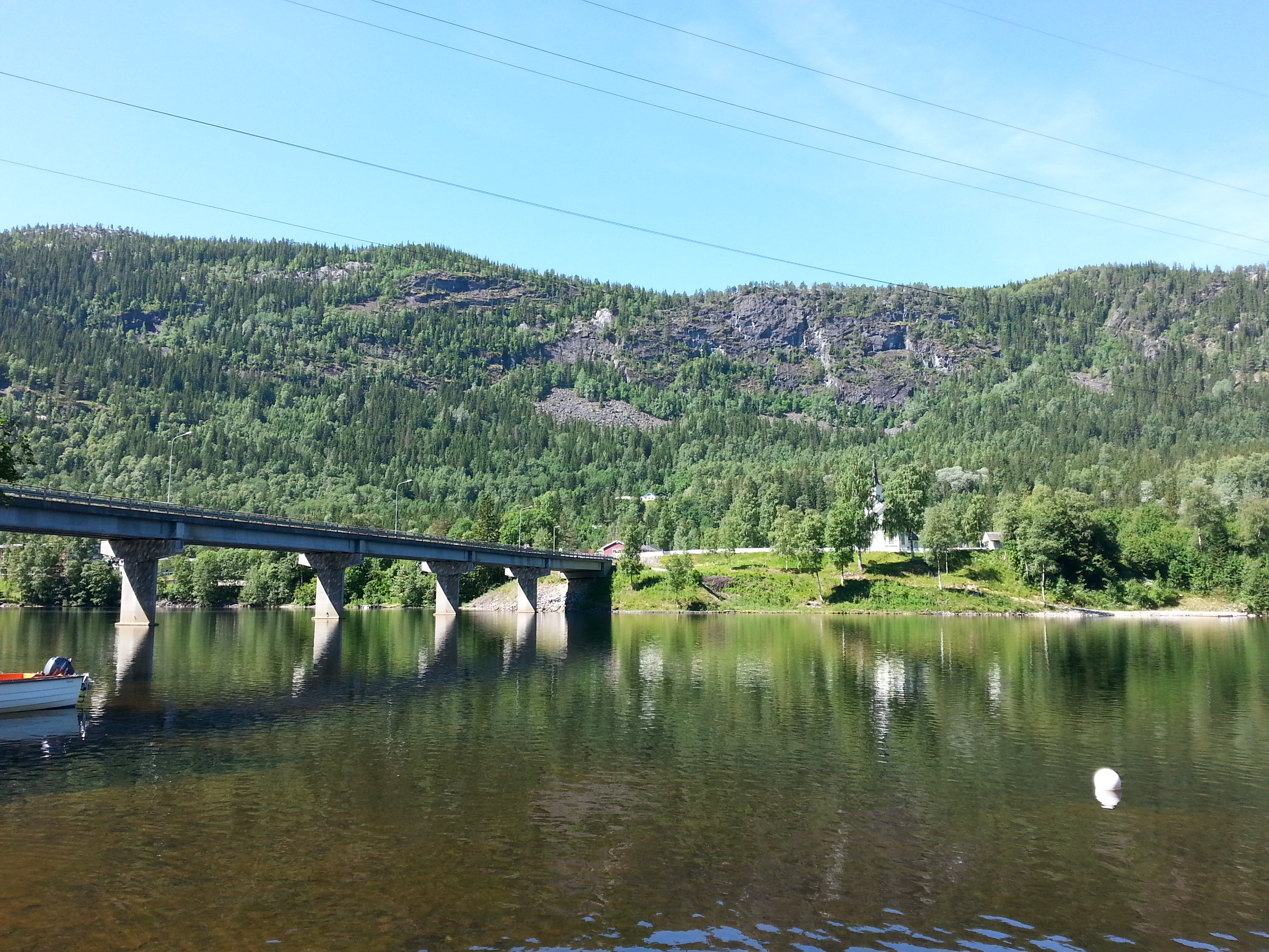 Norefjord bro, som går over Norefjorden i Nore og Uvdal kommune i Buskerud.